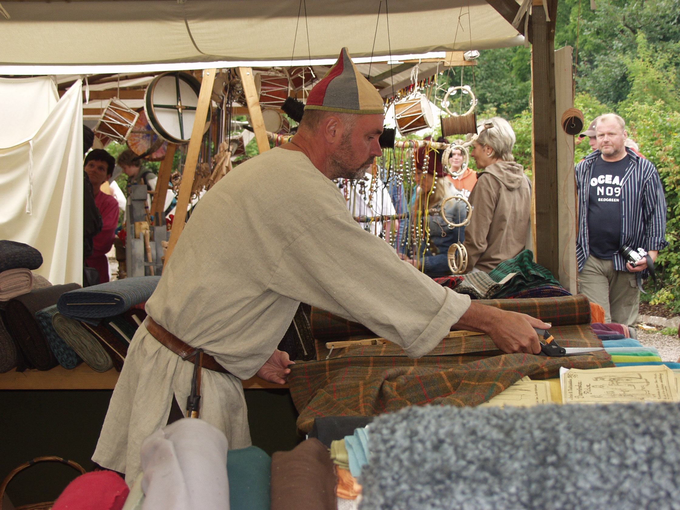 Mittelaltermarkt bei der Medeltidsveckan in Visby, Gotland, Schweden